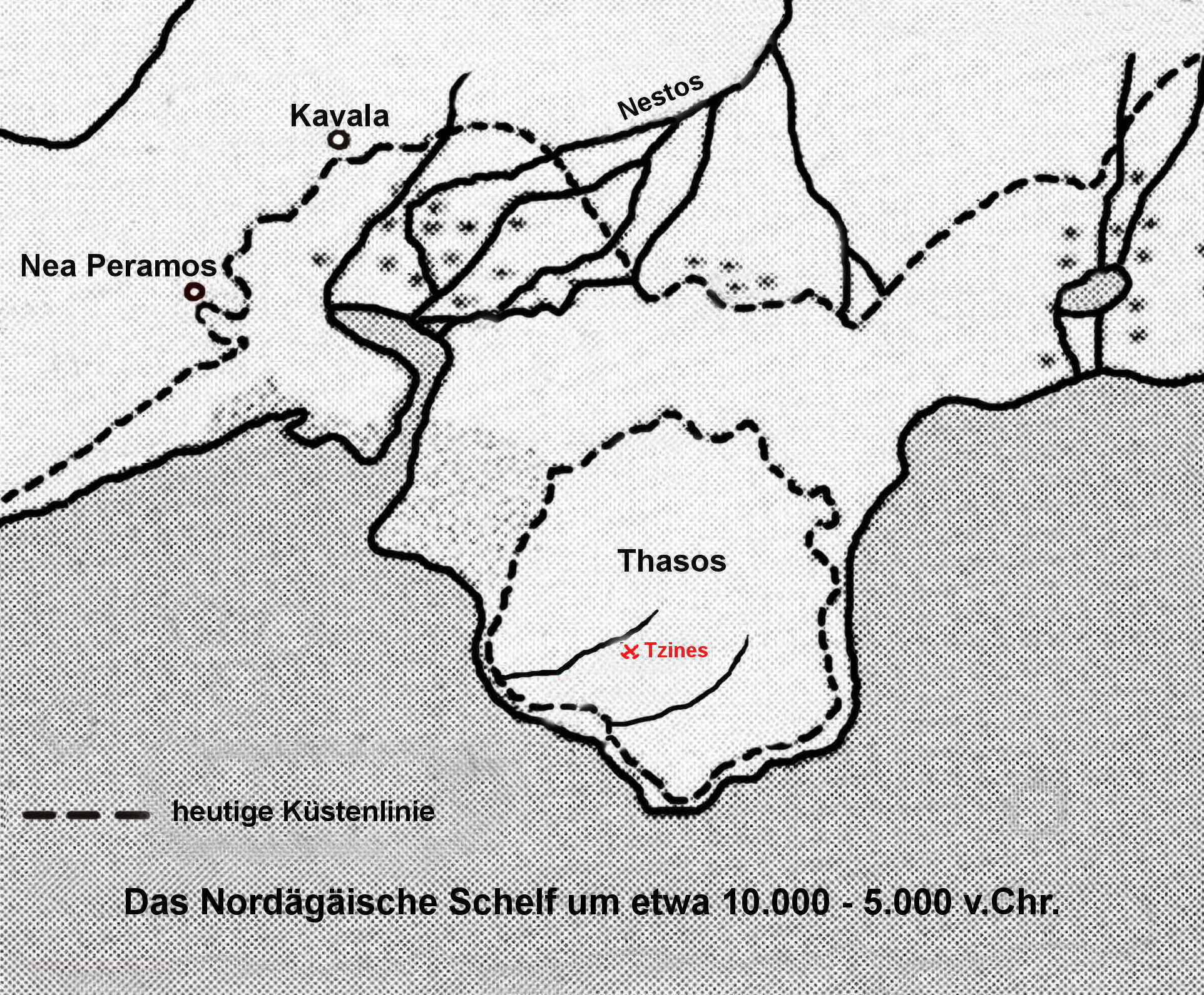 Nordägäisches Schelf um etwa 10.500 v.Chr.